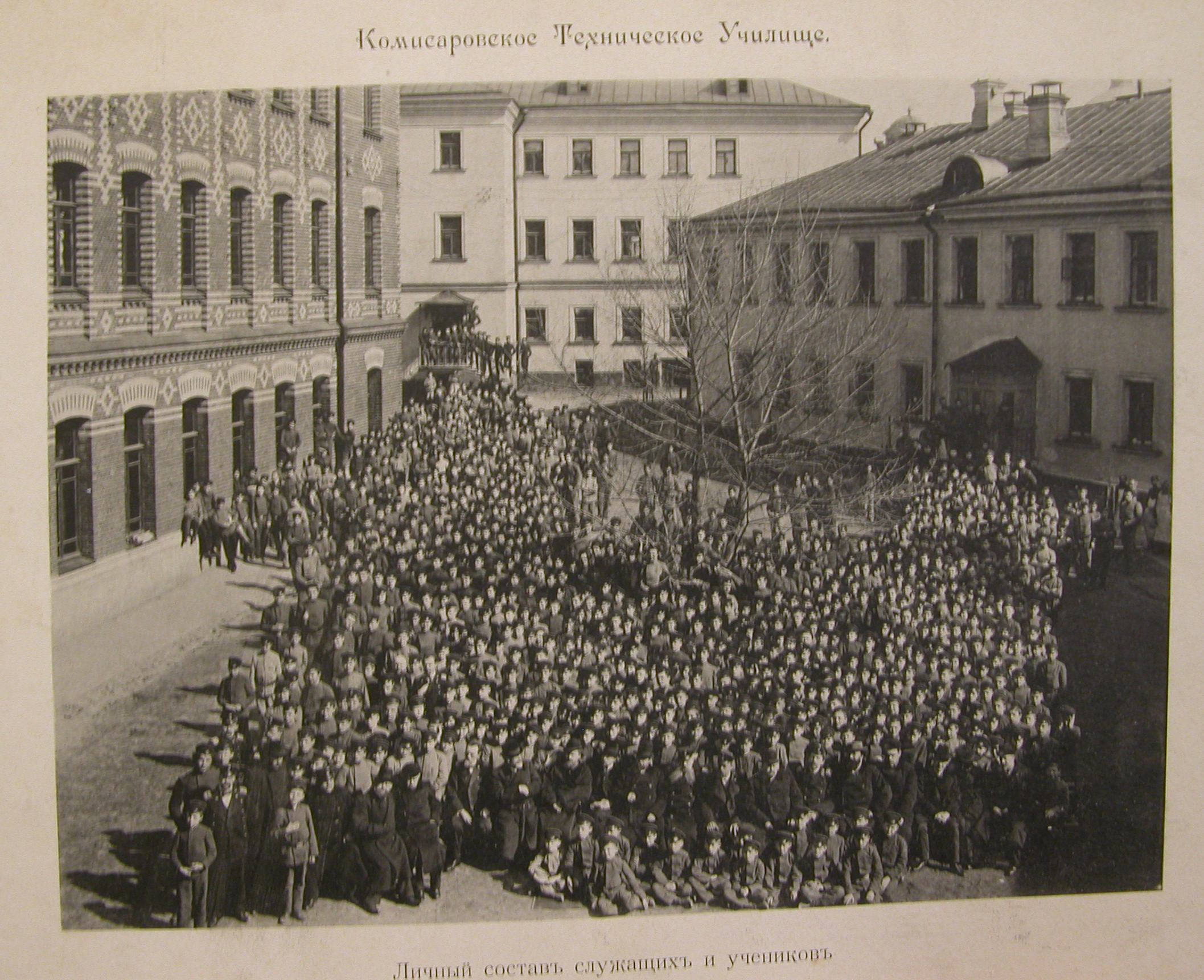 Комиссаровское техническое училище. Во внутреннем дворе. Вид на север. Все изображённые здания сохранились (центрально и правое выходят непосредственно на Благовещенский переулок, левое стоит внутри двора военной части)